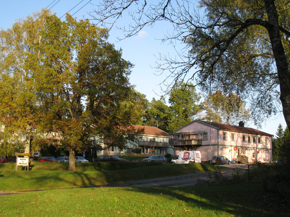 Hällingsjö, Härryda kommun, Västra Götaland